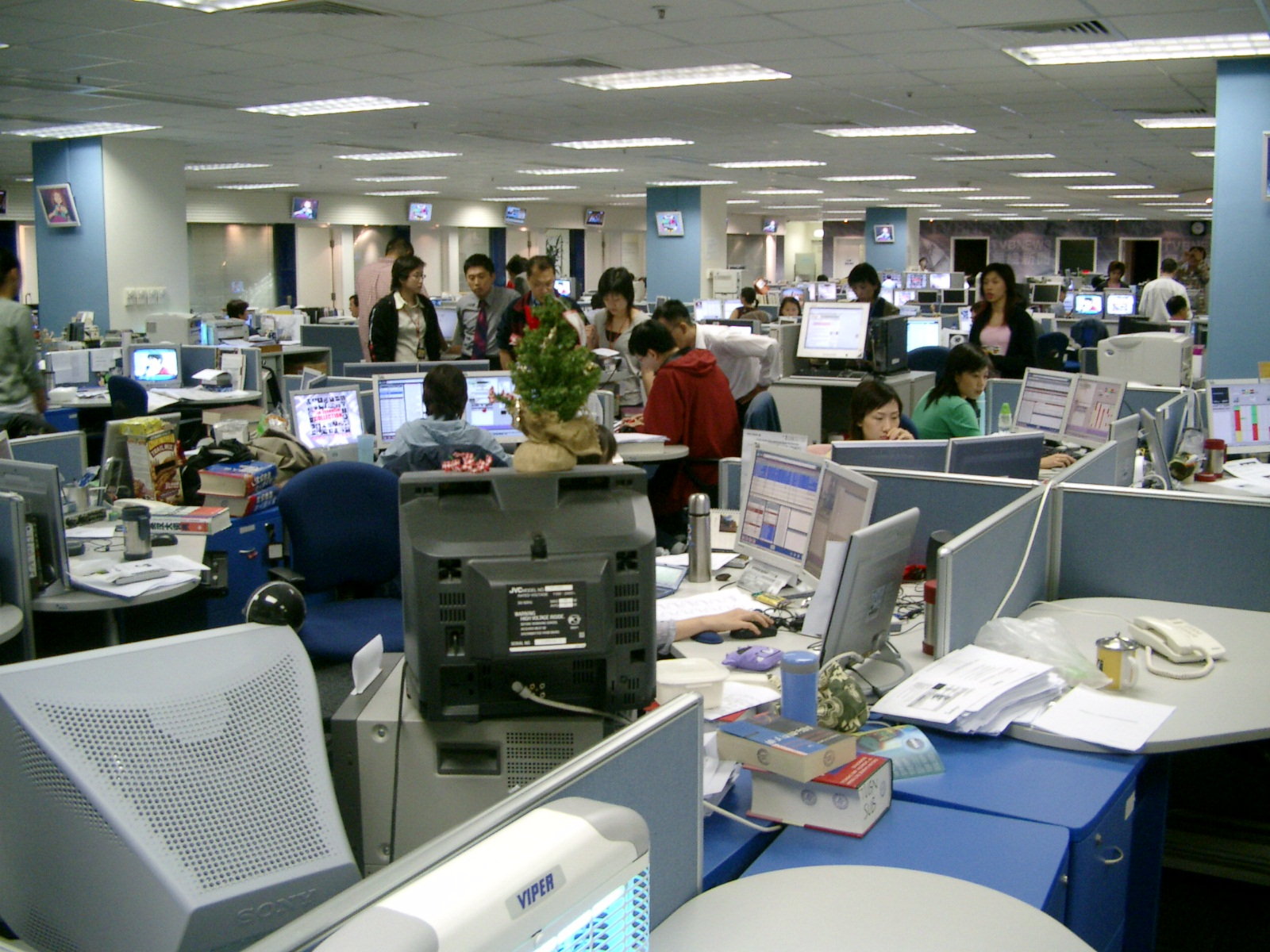 HKTVB Newsroom